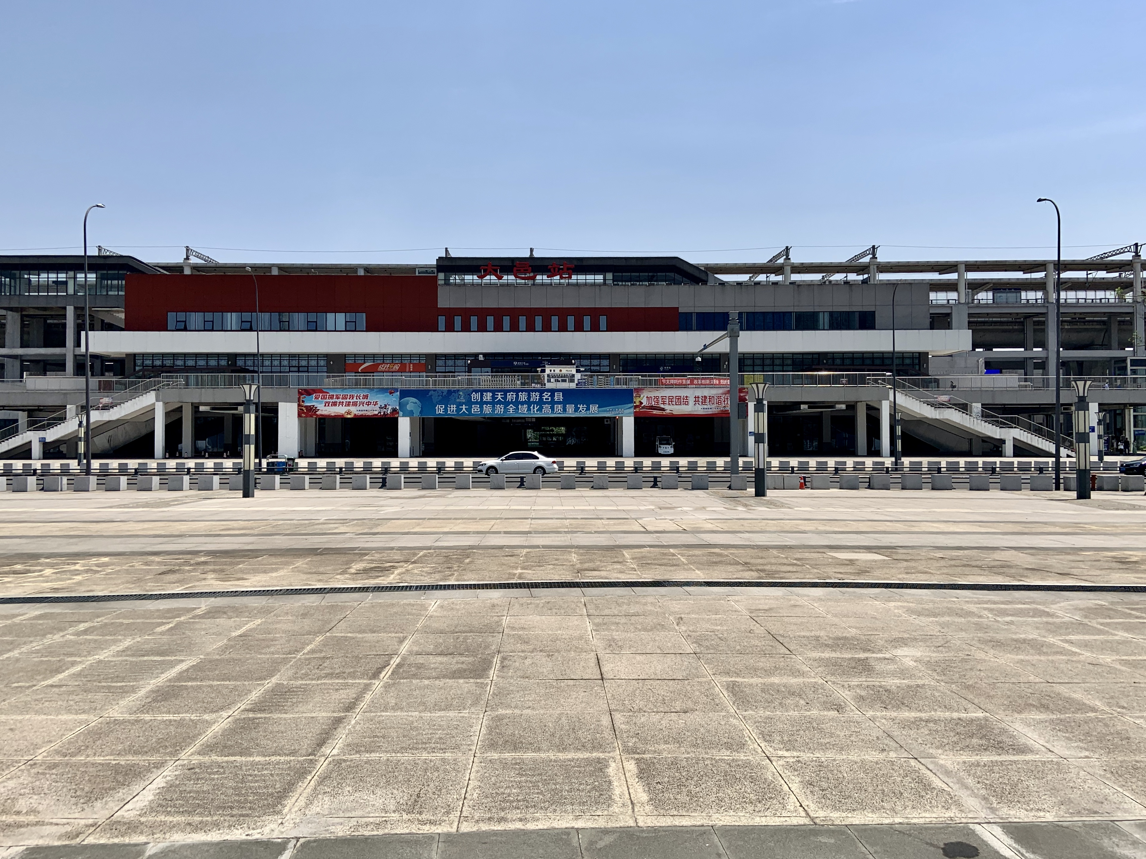 大邑站站房正面